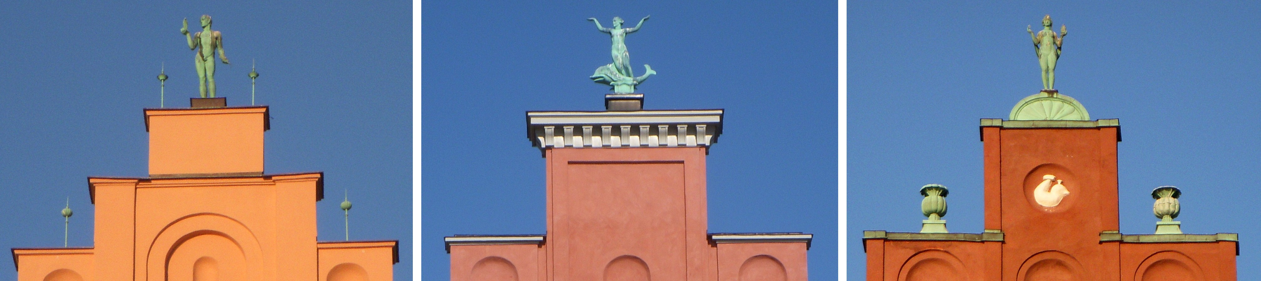 Takskultpurer av Gustaf och Aron Sandberg på Norr Mälarstrand 28-32